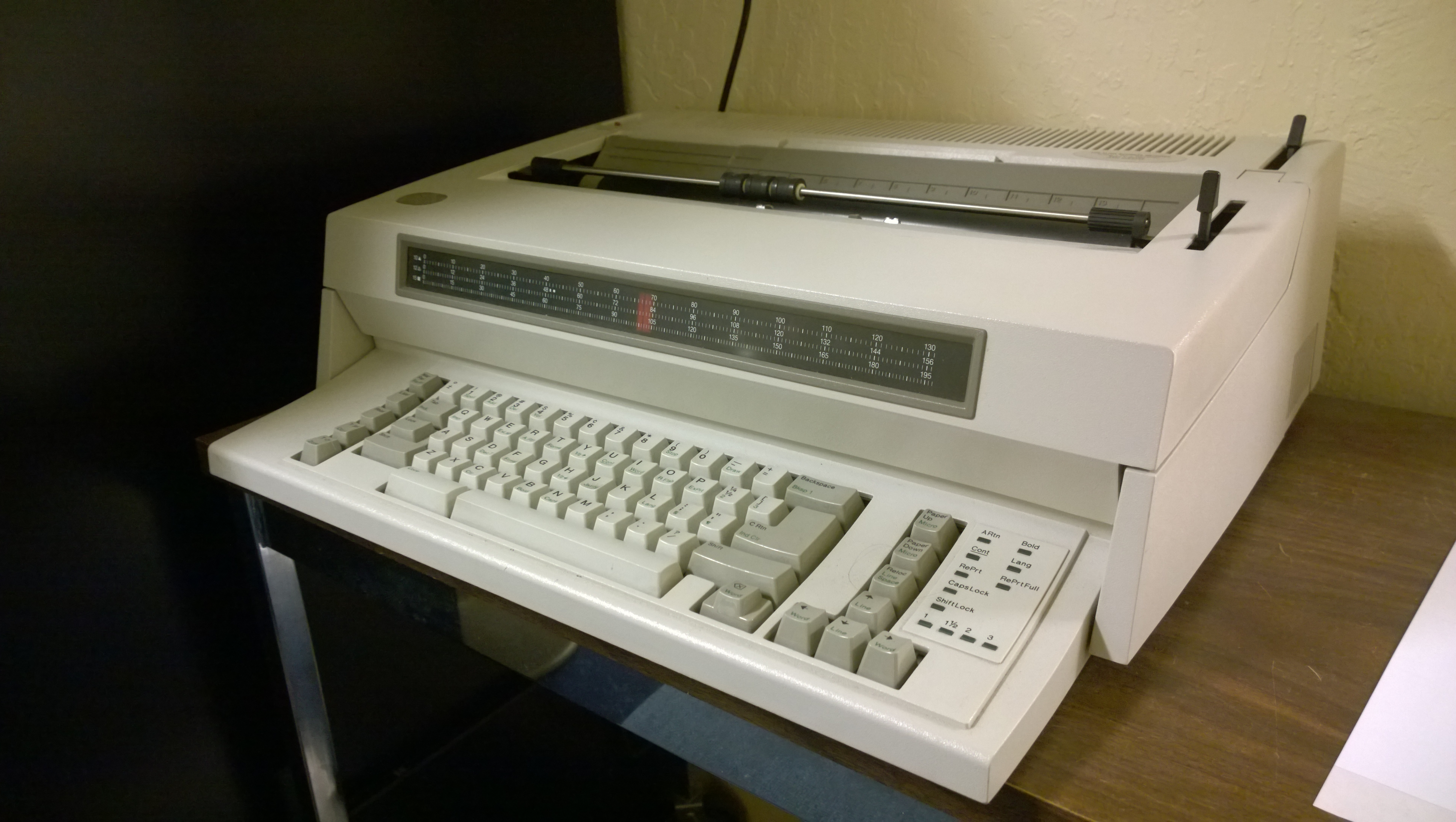 WP_20150901_06_26_36_Pro